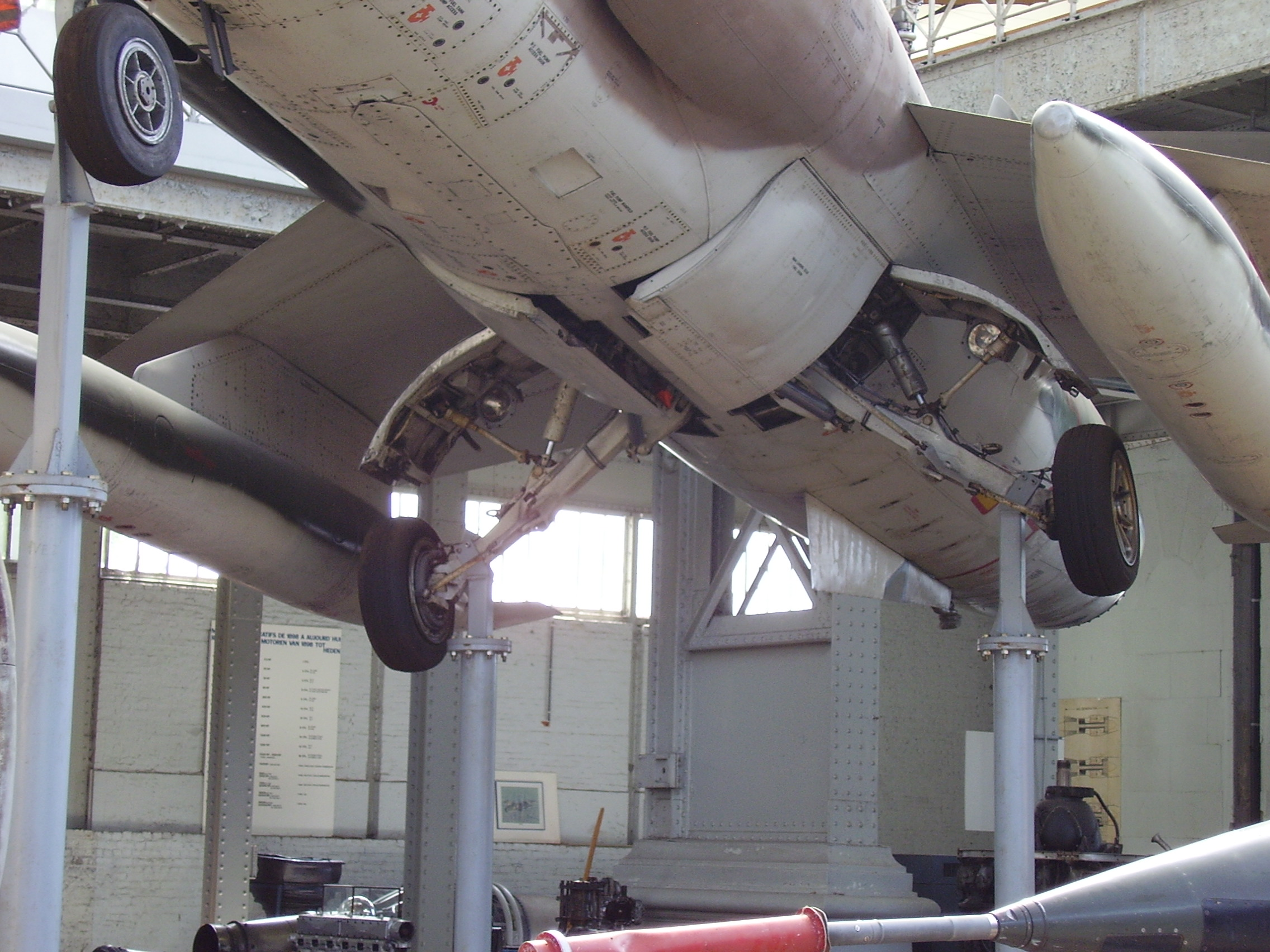 Royal Military Museum Brussels, Musée Royal de l'Armée, Koninklijk Museum van het Leger en de Krijgsgeschiedenis